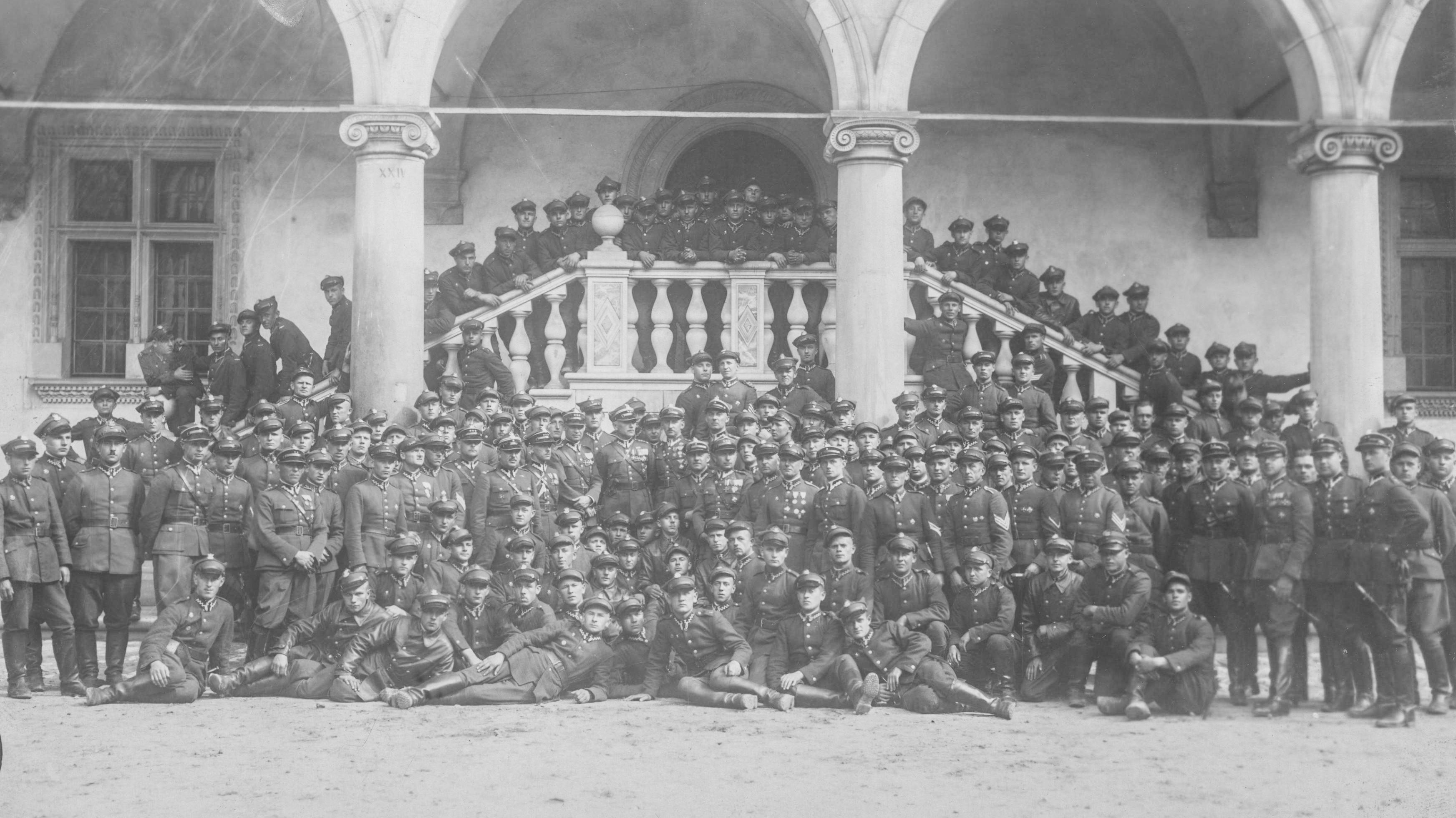 1 Pułk Artylerii Najcięższej na Wawelu. Fotografia grupowa uczestników wycieczki na dziedzińcu wawelskim. Koncern Ilustrowany Kurier Codzienny - Archiwum Ilustracji. Sygnatura: 1-W-1530